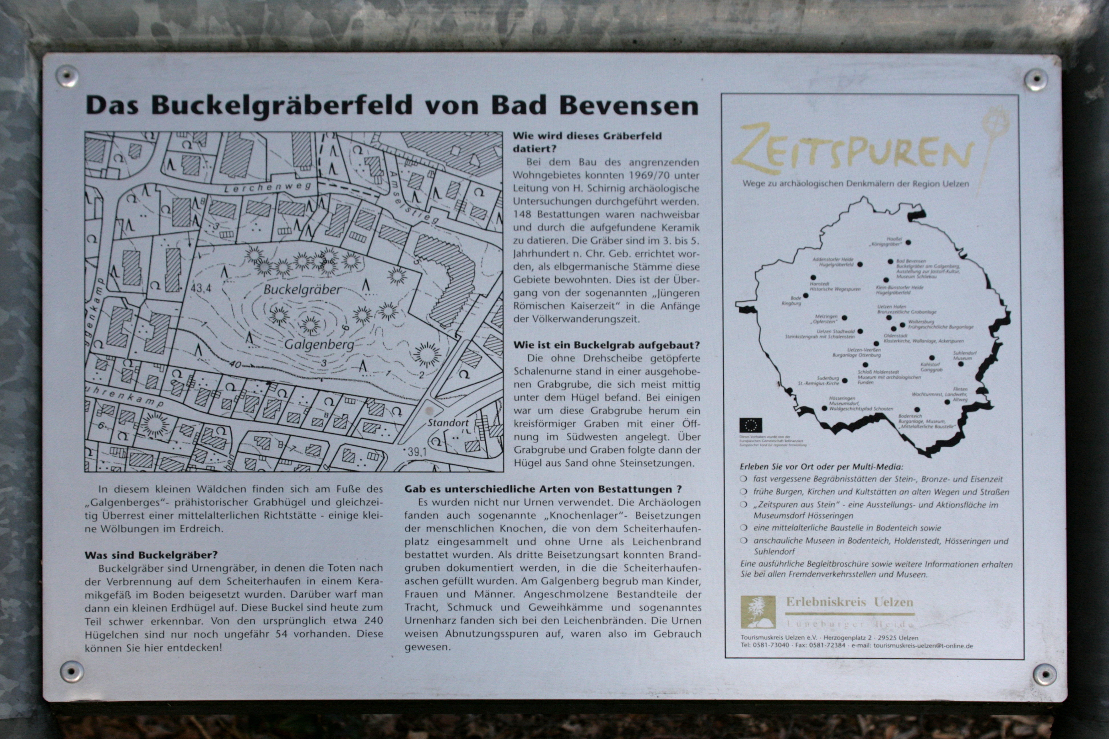 Buckelgräberfeld aus dem 3. bis 5. Jahrhundert am Galgenberg an der Römstedter Straße in Bad Bevensen